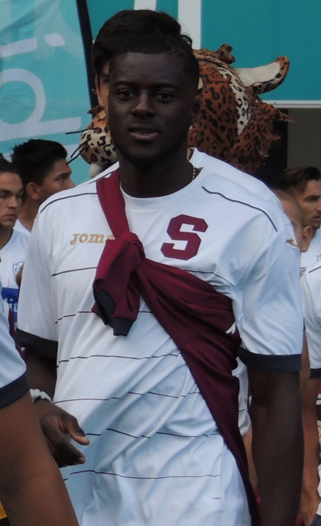 Esta obra de Luis Manuel Madrigal está bajo una licencia de Creative Commons Reconocimiento-CompartirIgual 4.0 Internacional. Para una versión sin logo escriba a